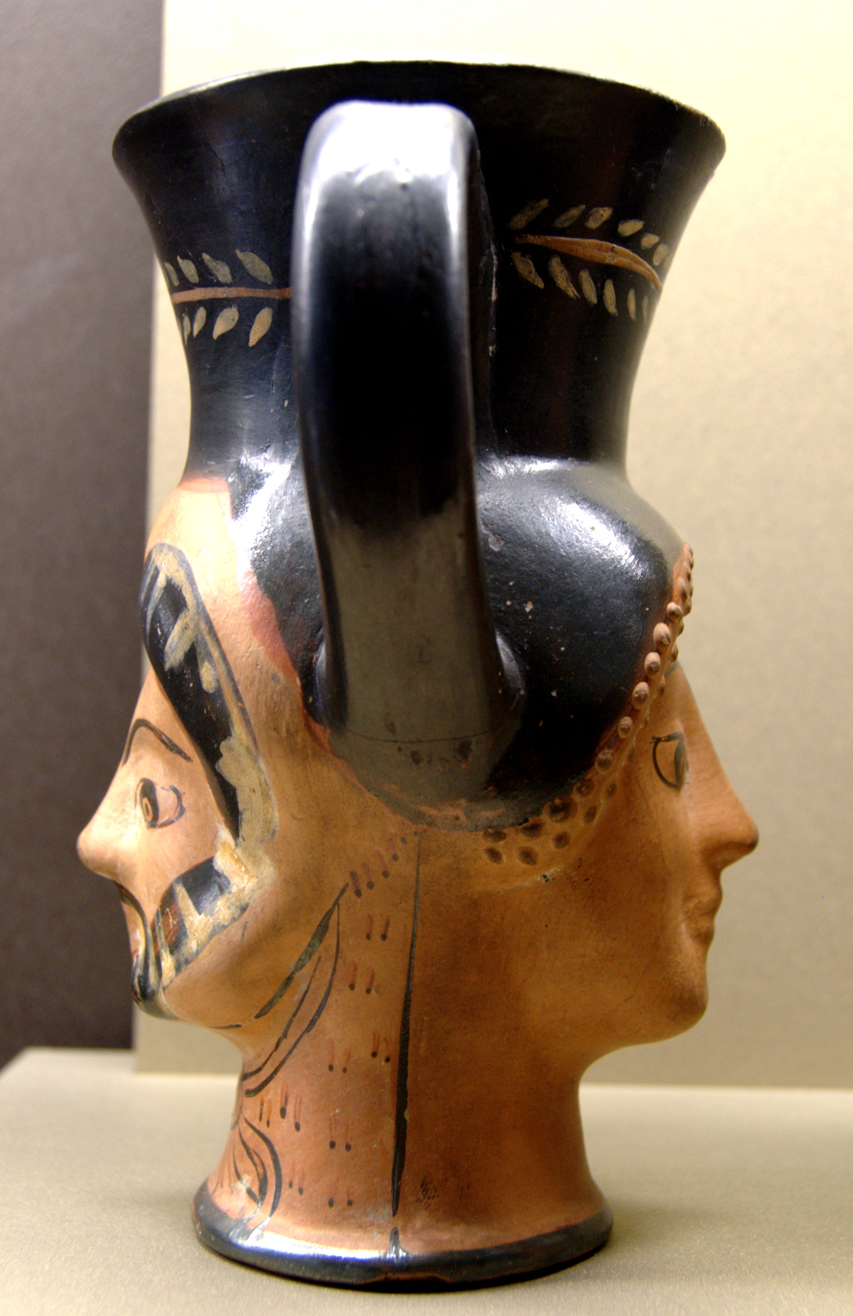 Attic red-figured janiform kantharos (Heracles head and female head), ca. 480–460 BC. From Italy (?).